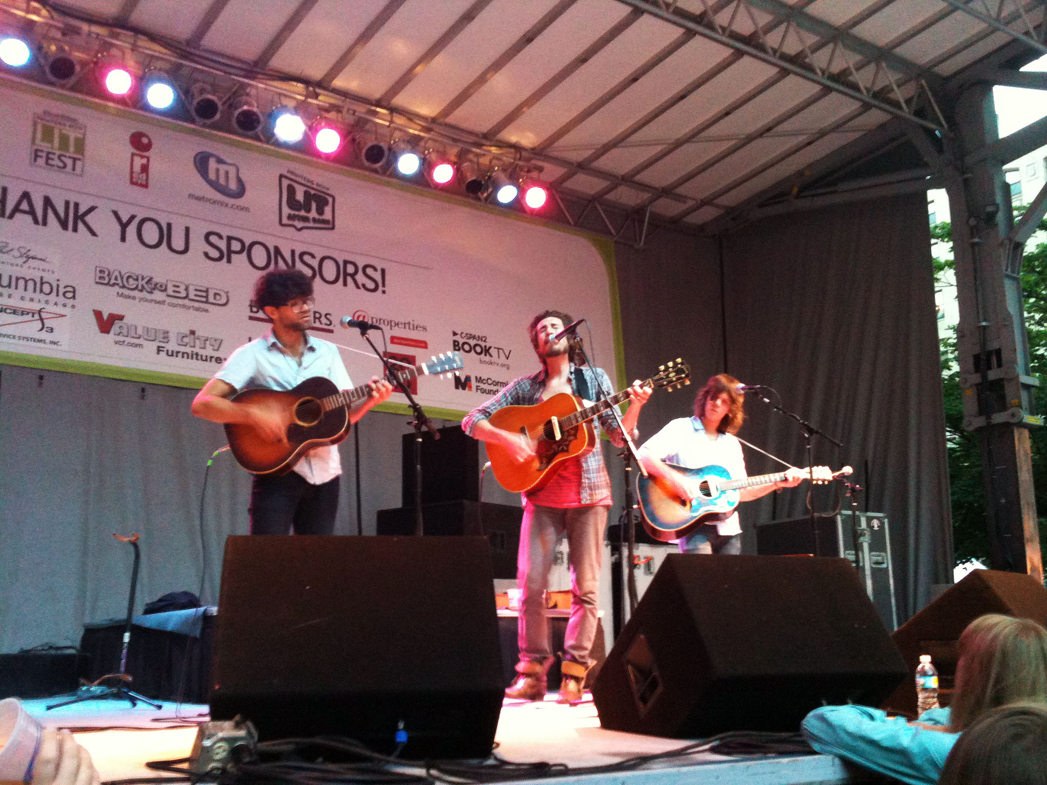 Augustana